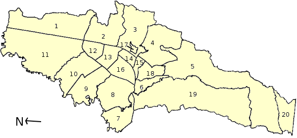 Administrative Gliederung von Bogotá, Kolumbien / Municipalities of Bogotá, Colombia / Localidades de Bogotá, Colombia. 1 - Usaquén, 2 - Chapinero, 3 - Santafé, 4- San Cristóbal, 5 - Usme, 6 - Tunjuelito, 7 - Bosa, 8 - Kennedy, 9 - Fontibón, 10 - Engativá, 11 - Suba, 12 - Barrios Unidos, 13 - Teusaquillo, 14 - Los Mártires, 15 - Antonio Nariño, 16 - Puente Aranda, 17 - La Candelaria, 18 - Rafael Uribe, 19 - Ciudad Bolívar, 20 - Sumapaz